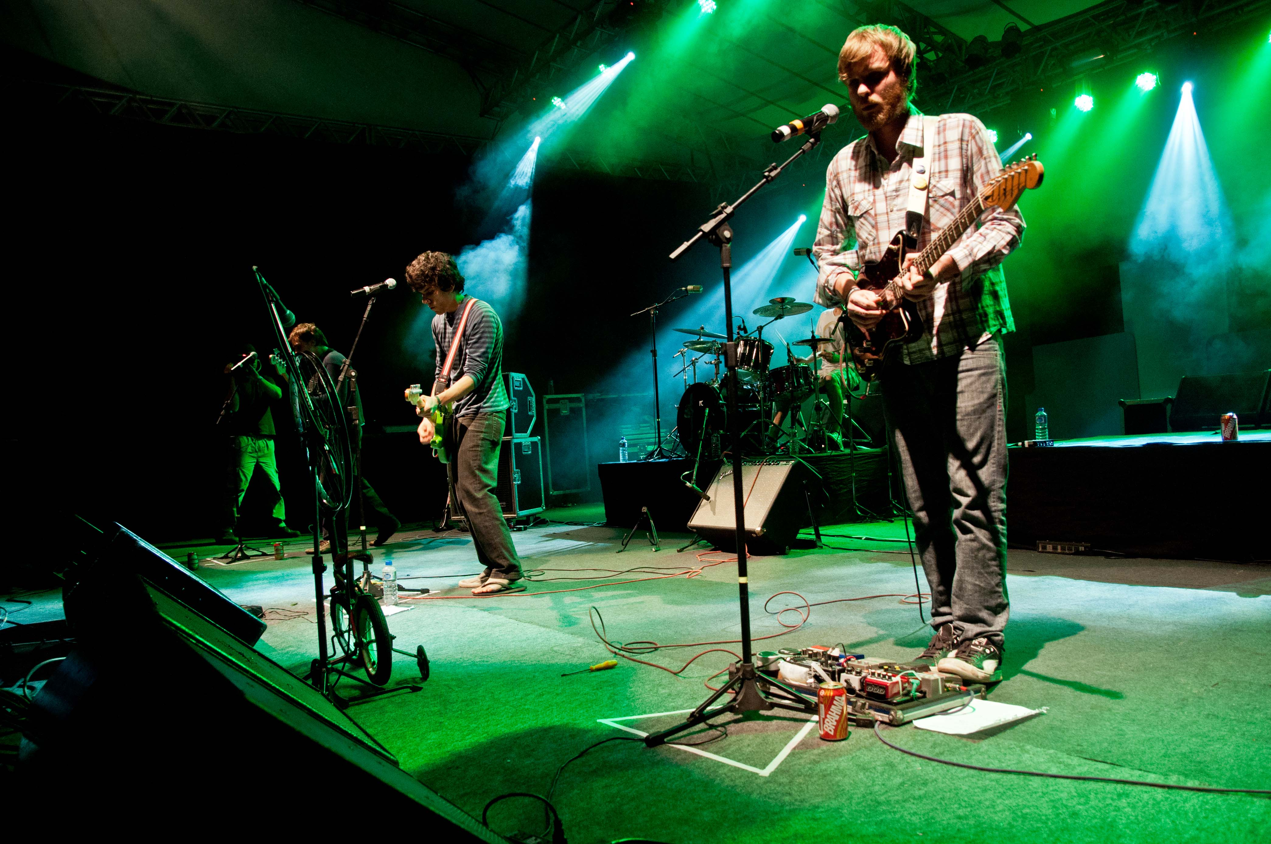 Conexão Vivo 2012 Belo Horizonte Apanhador Só Shows de Família de Rua apresenta "O Som Que Vem das Ruas", Aeromoças e Tenistas Russas, O Círculo, Manuela Rodrigues, Apanhador Só, Garotas Suecas, Bixiga 70 Parque Municipal - Belo Horizonte 20/05/2012 (CC BY-SA) Rayza Lélis